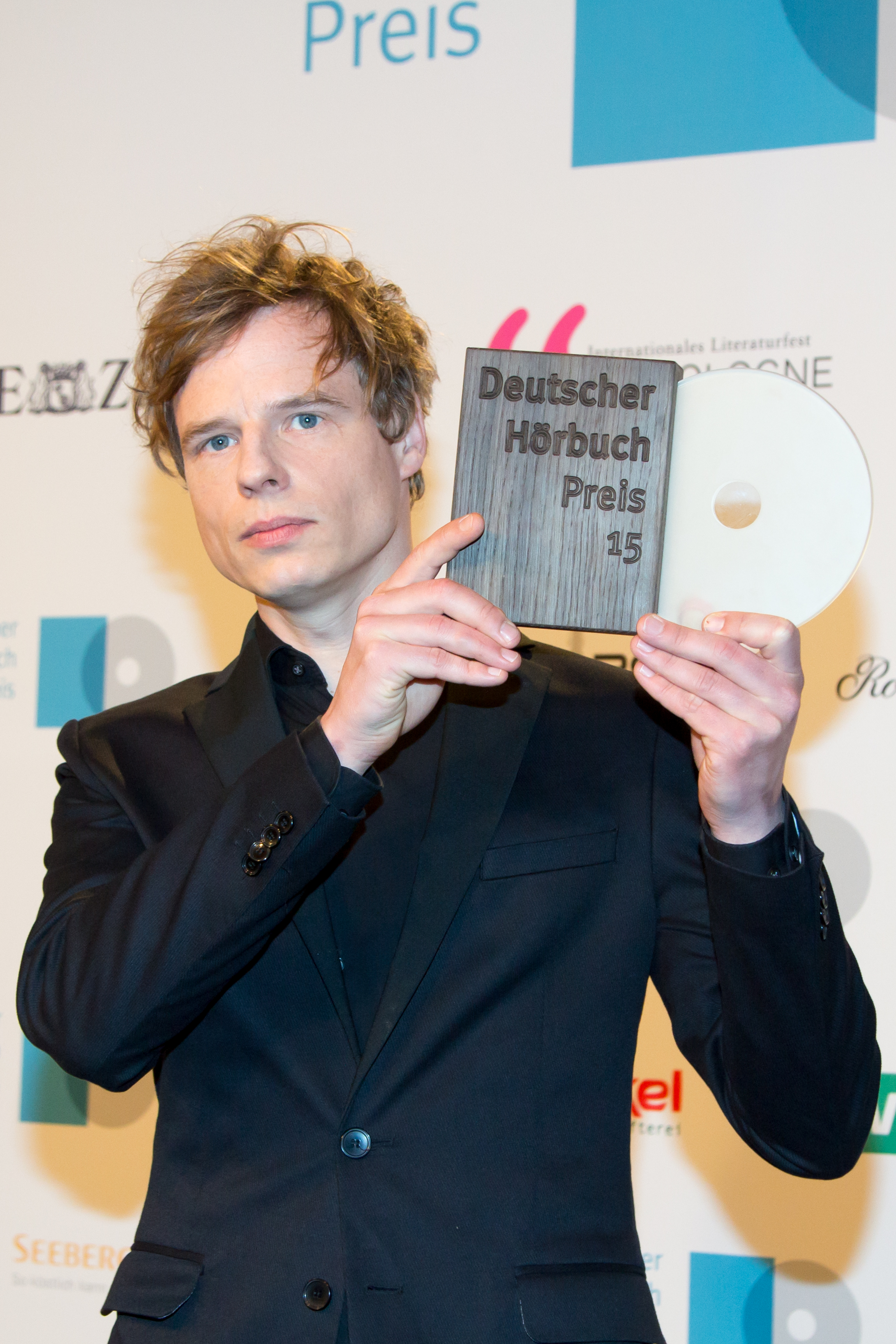 Deutscher Hörbuchpreis 2015; Jörg Pohl Bestes Kinderhörbuch